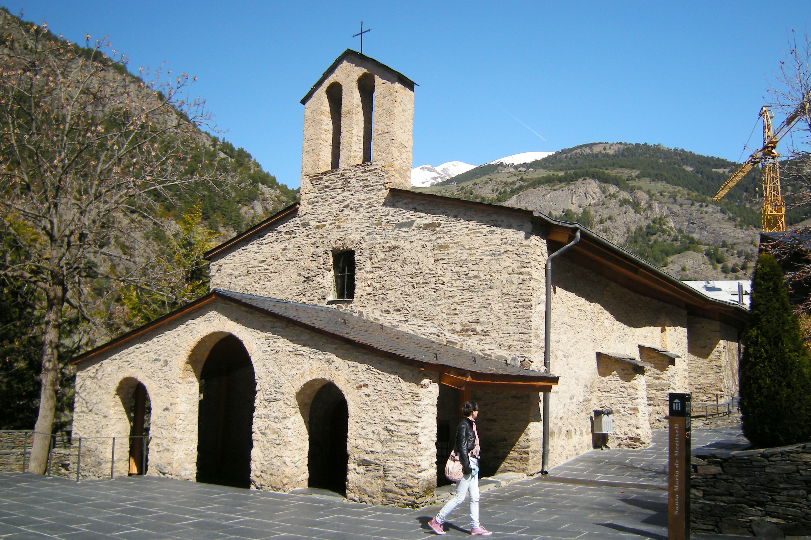 L'antigua capella de Marixell